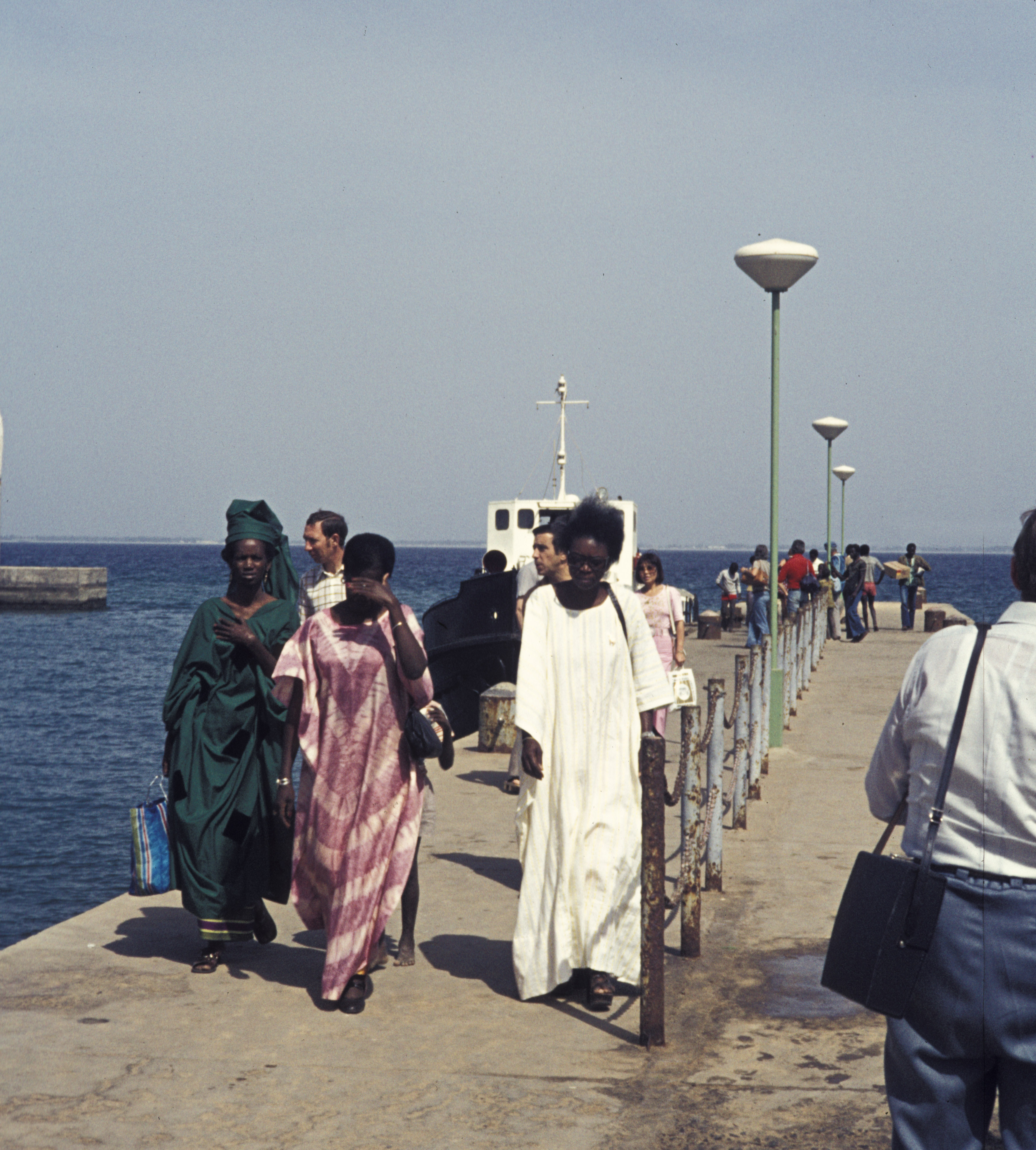 Senegal (Gorée ?)